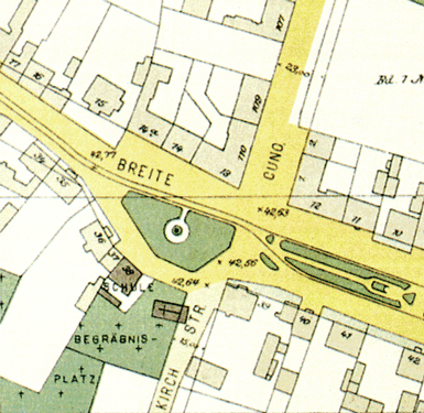 Kartenausschnitt mit Dorfanger Schmargendorf